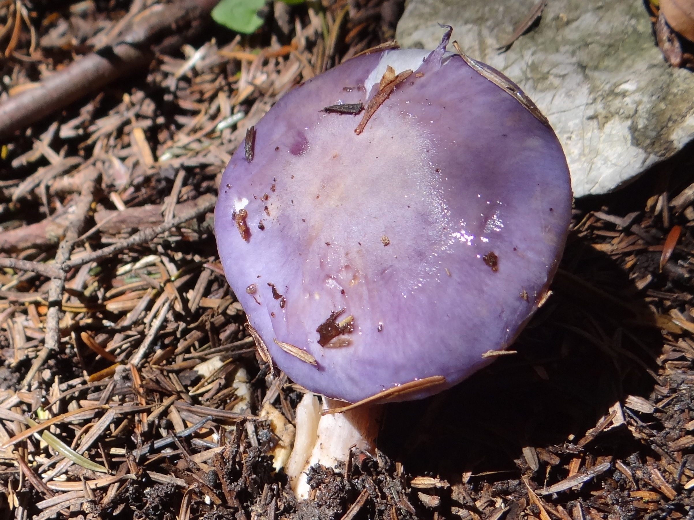 Cortinarius salor (location:Poland, Pieniny, rejon przełęczy Trzy Kopce)